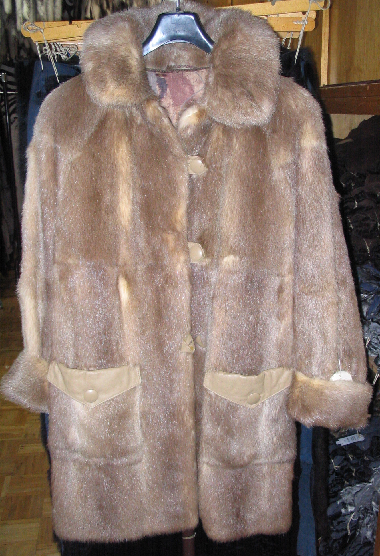 Alte Pahmijacke